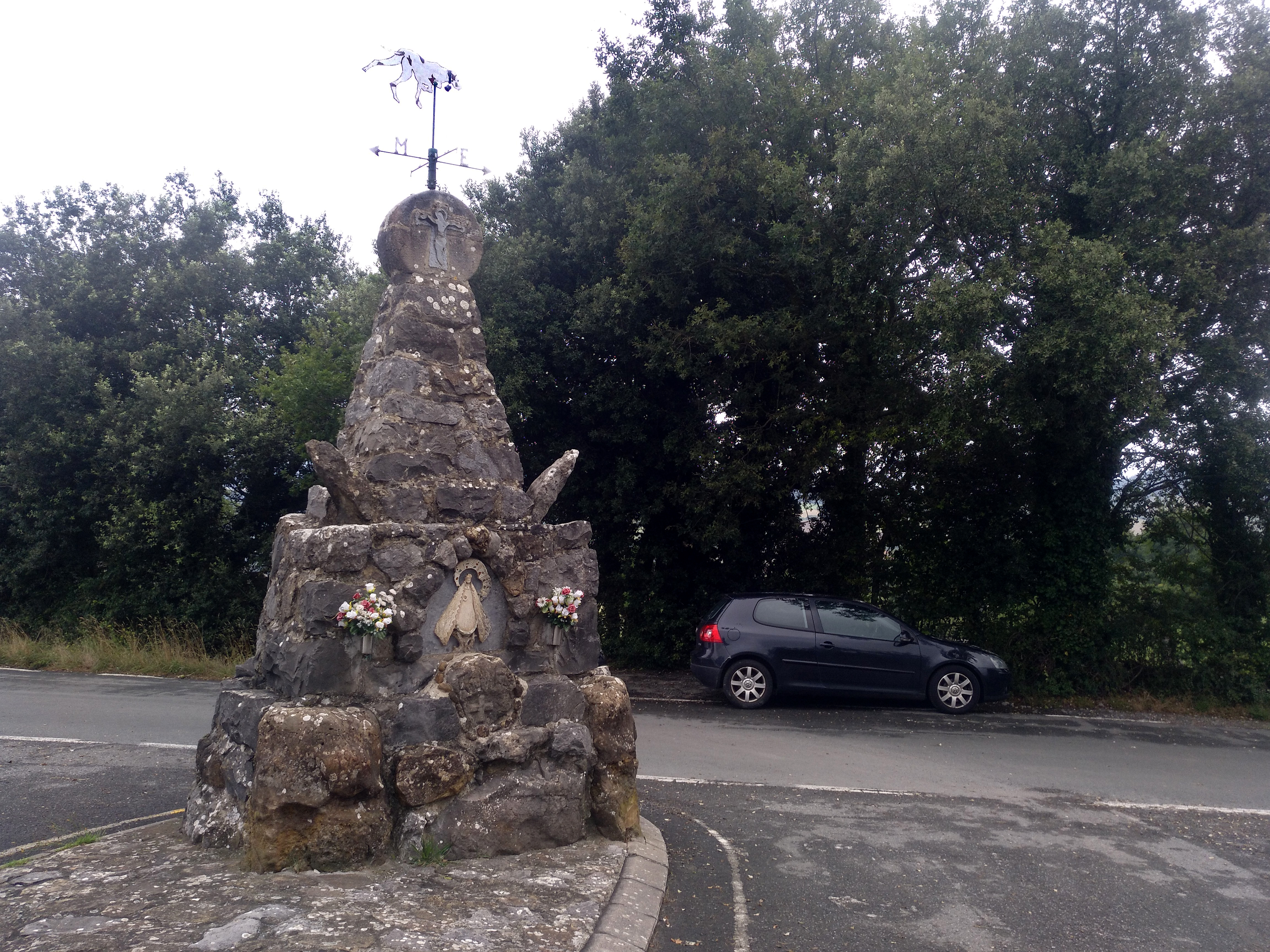 Mendiola auzoa Eskoriatzan